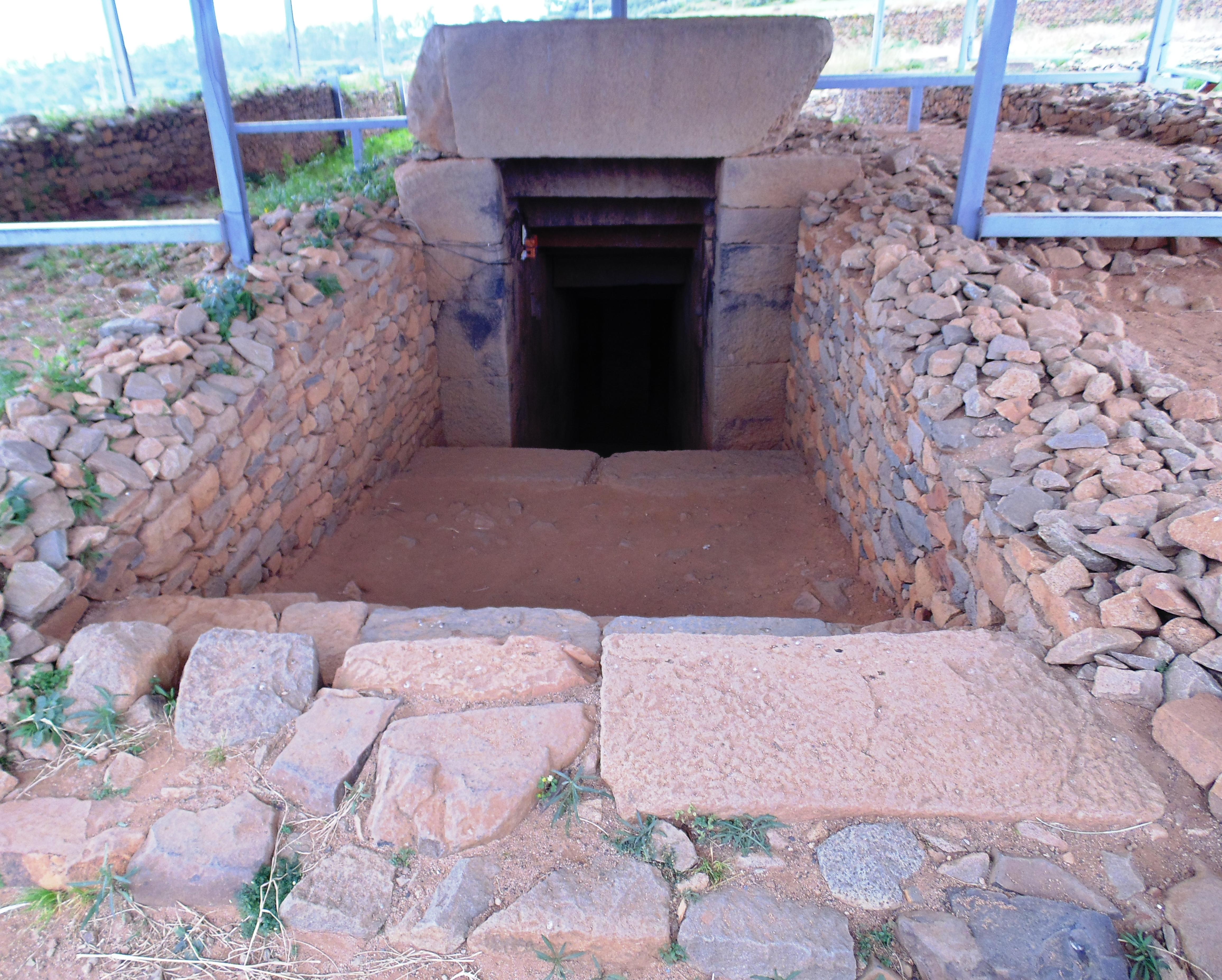 Руїни палацу царя Калеба (відомого також як "гробниця Калеба") в Аксумі